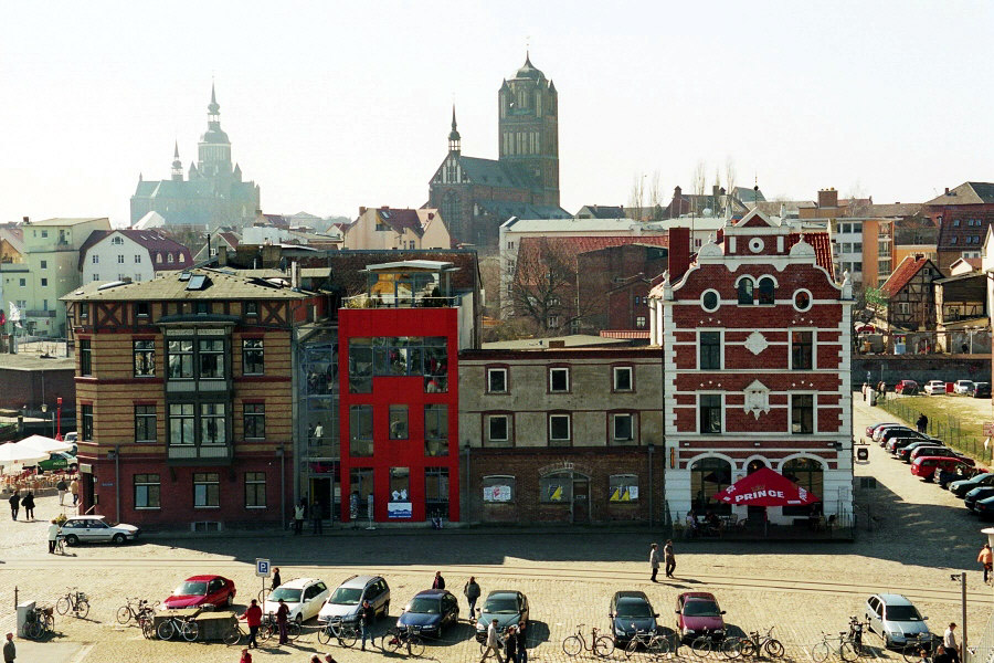 selbst fotografiert, GNU-FDL